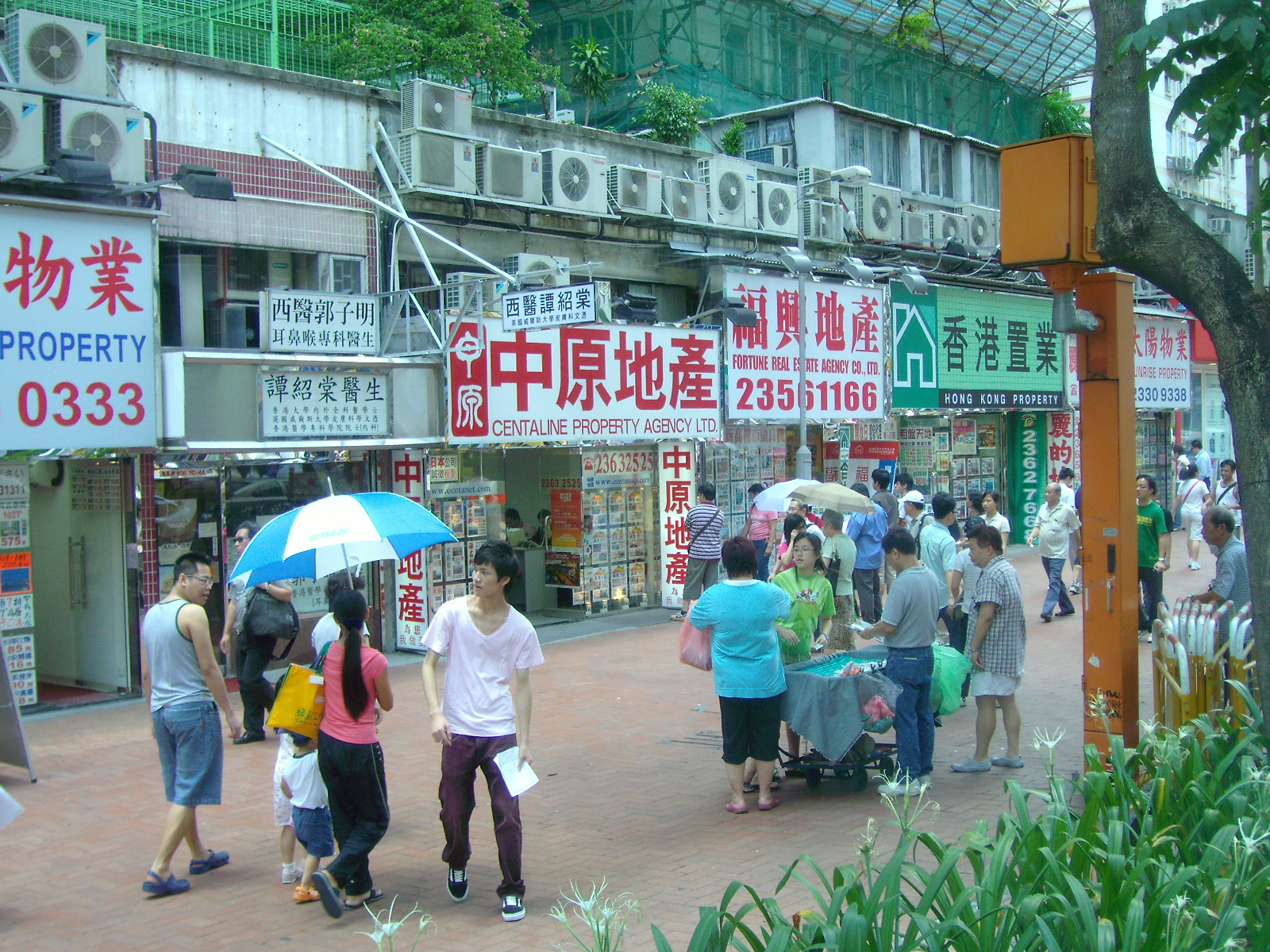 中文（中国大陆）: 香港紅磡zh:德民街